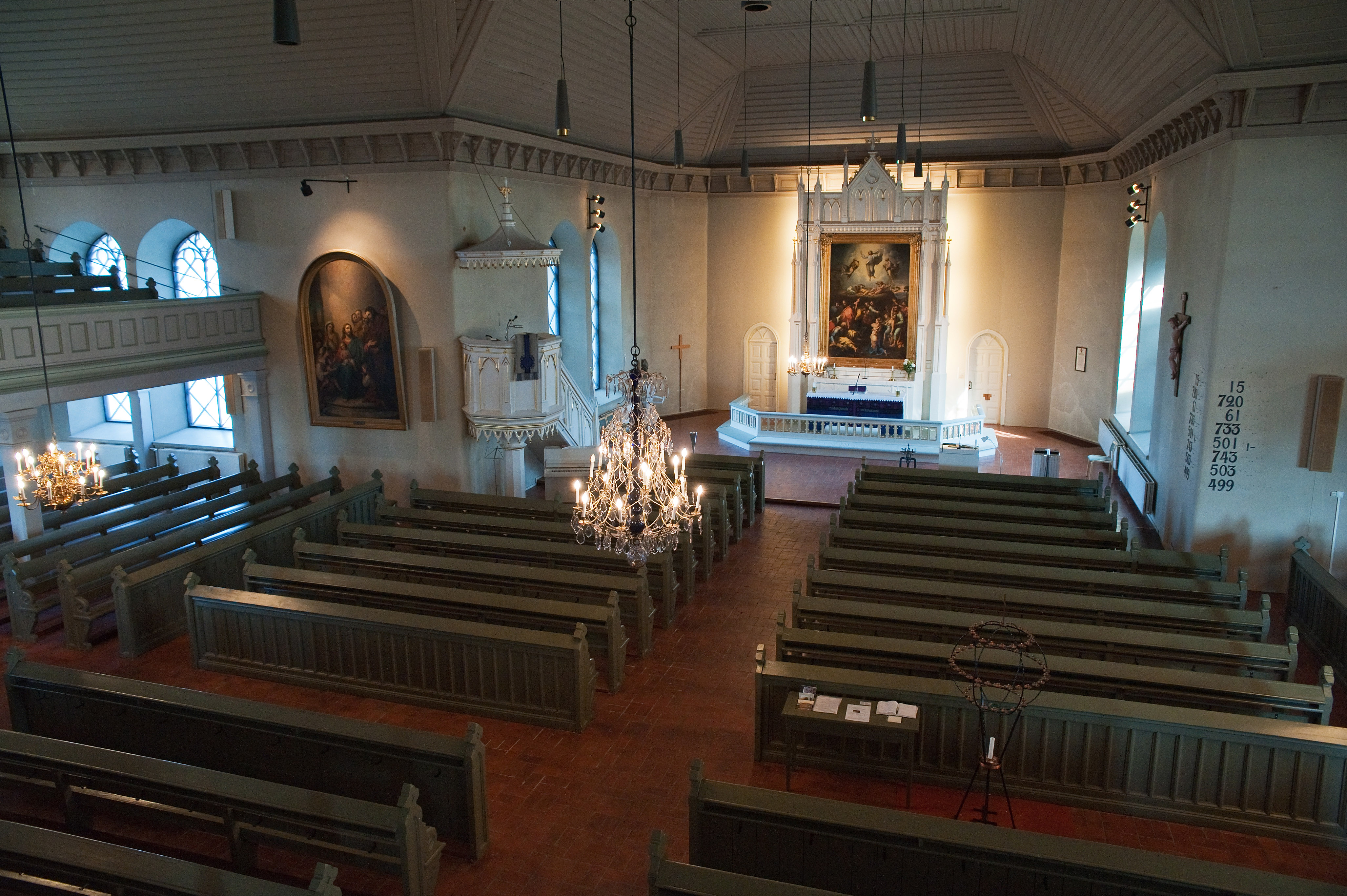 Yleiskuva urkuparvelta.